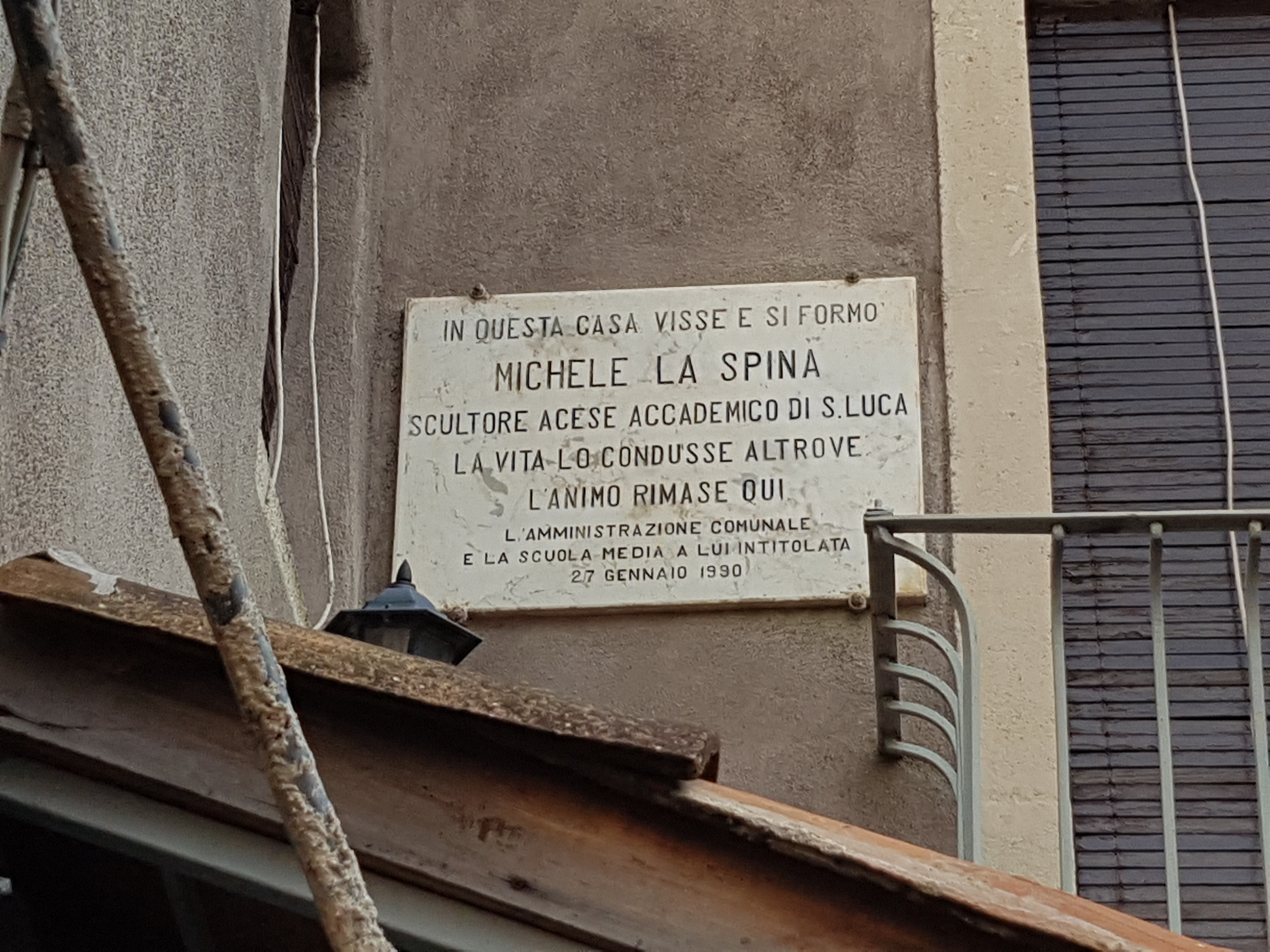 Targa commemorativa sulla casa acese dello scultore Michele La Spina.